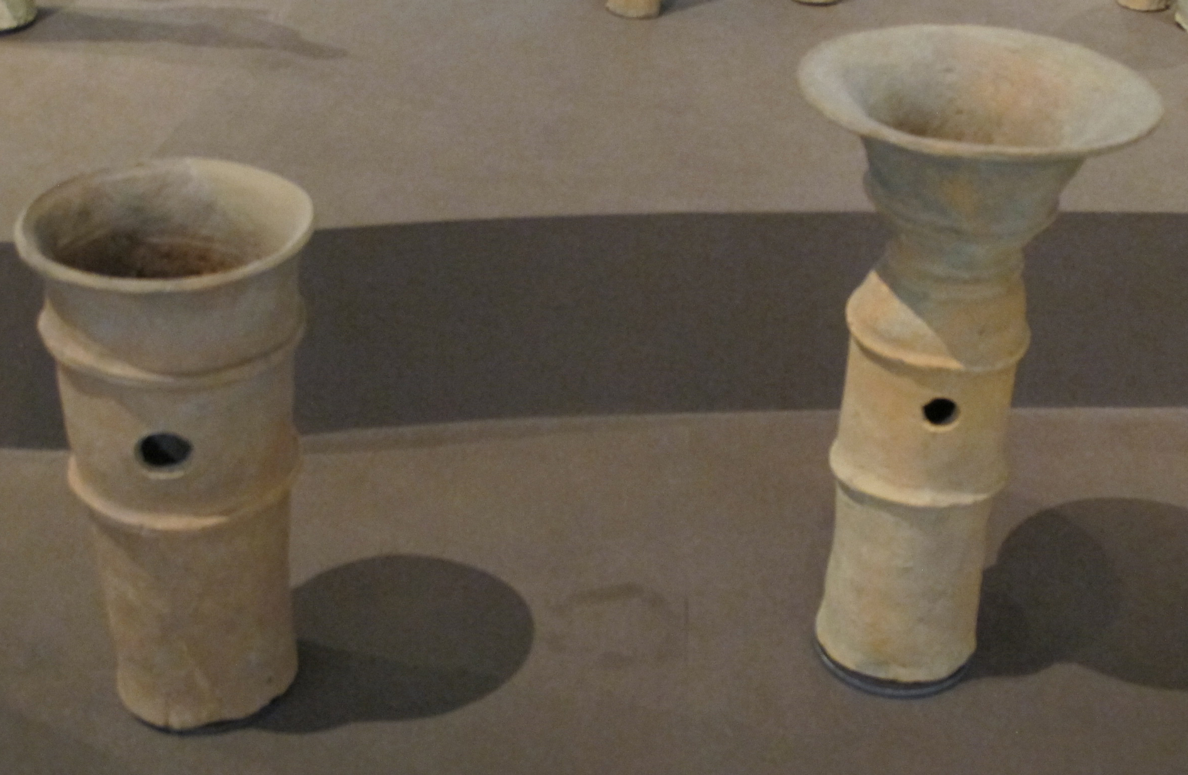 Periodo kofun, haniwa, cilindri, VI sec